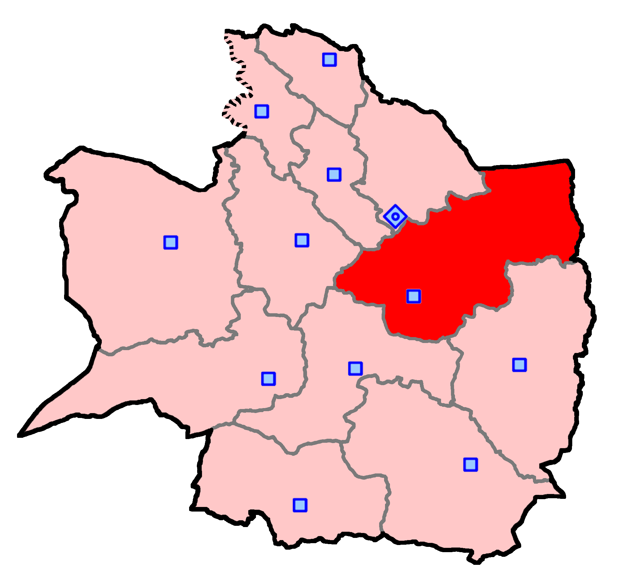 حوزهٔ انتخاباتی فریمان برای انتخابات مجلس شورای اسلامی